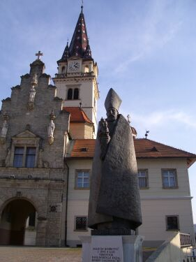 Borkovićev spomenik u Mariji Bistrici